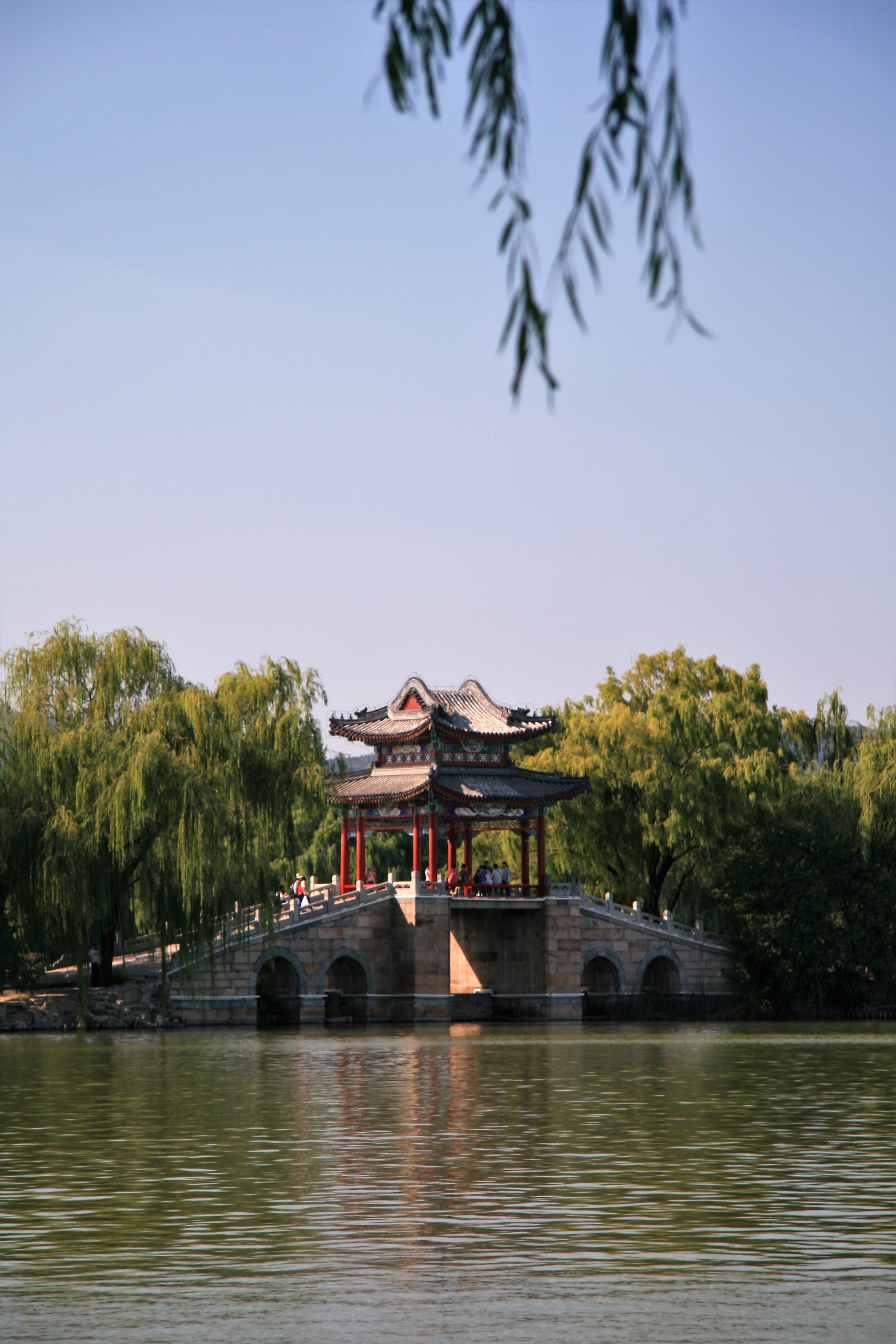 Ивовый мост в парке Летнего дворца в Пекине